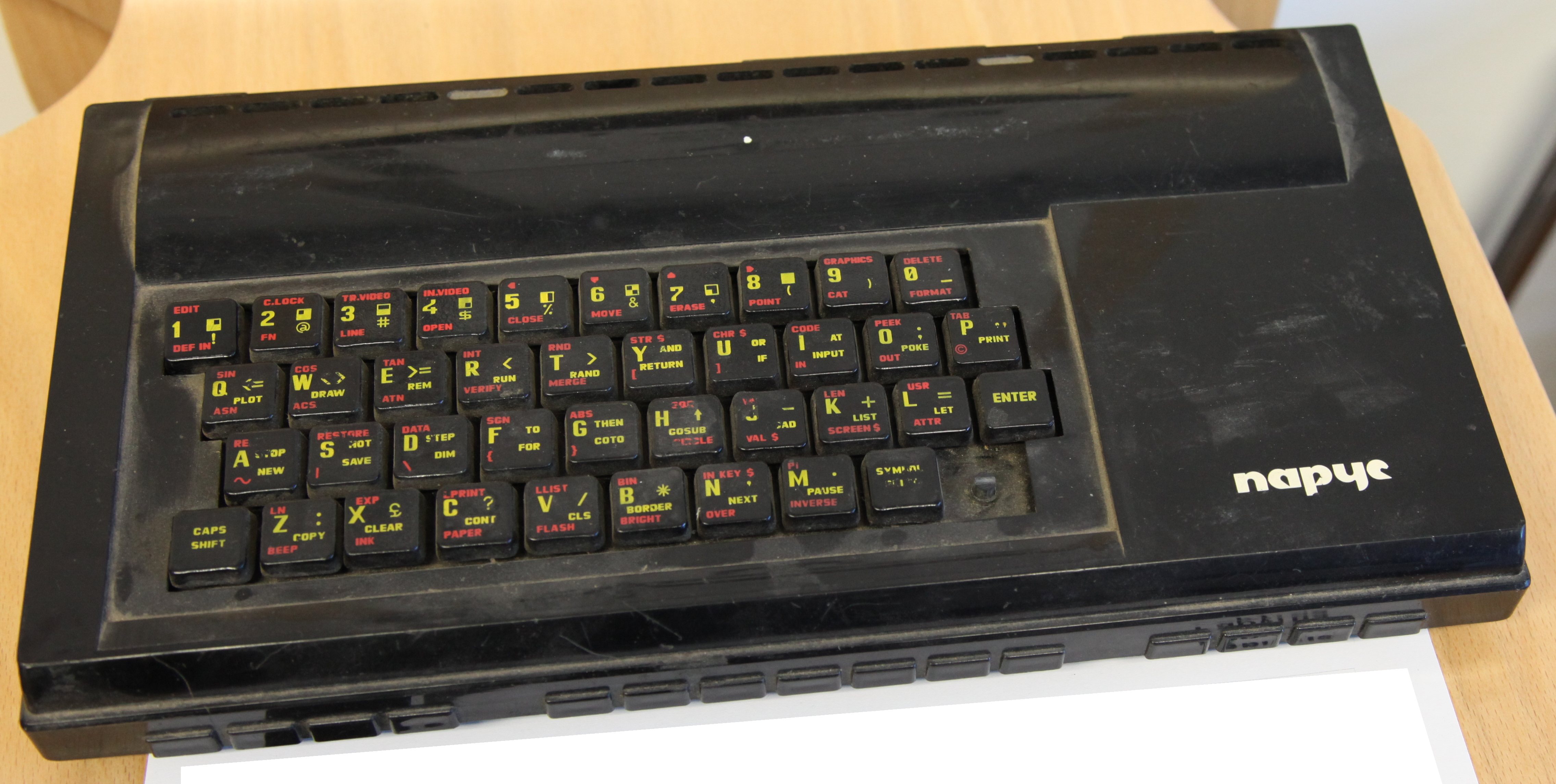 Парус ВИ201 Russischer ZX Spectrum 48K clone па́рус ВИ201 ("Sail VI-201")[1]